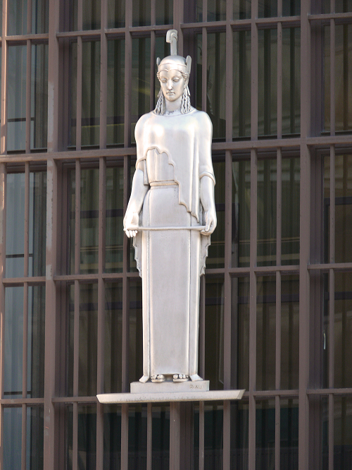 Façade de la Banque Nationale de Belgique